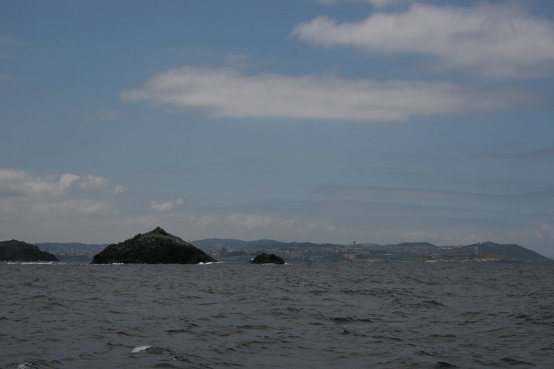 Illa da Marola (A Coruña)